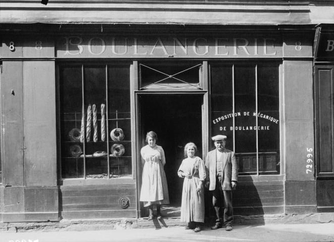 Boulangerie, rue de la Roquette, Paris 11e.